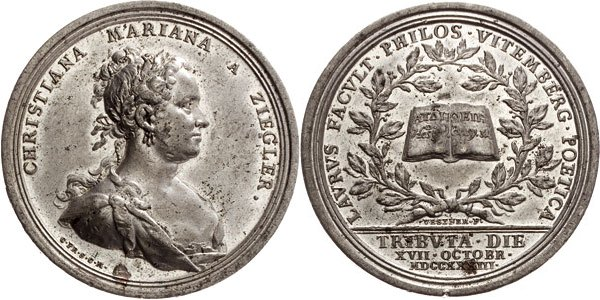 Medaille anlässlich der Krönung von Christiana Mariana von Ziegler zur "poeta laureata" durch die Universität Wittenberg 1733